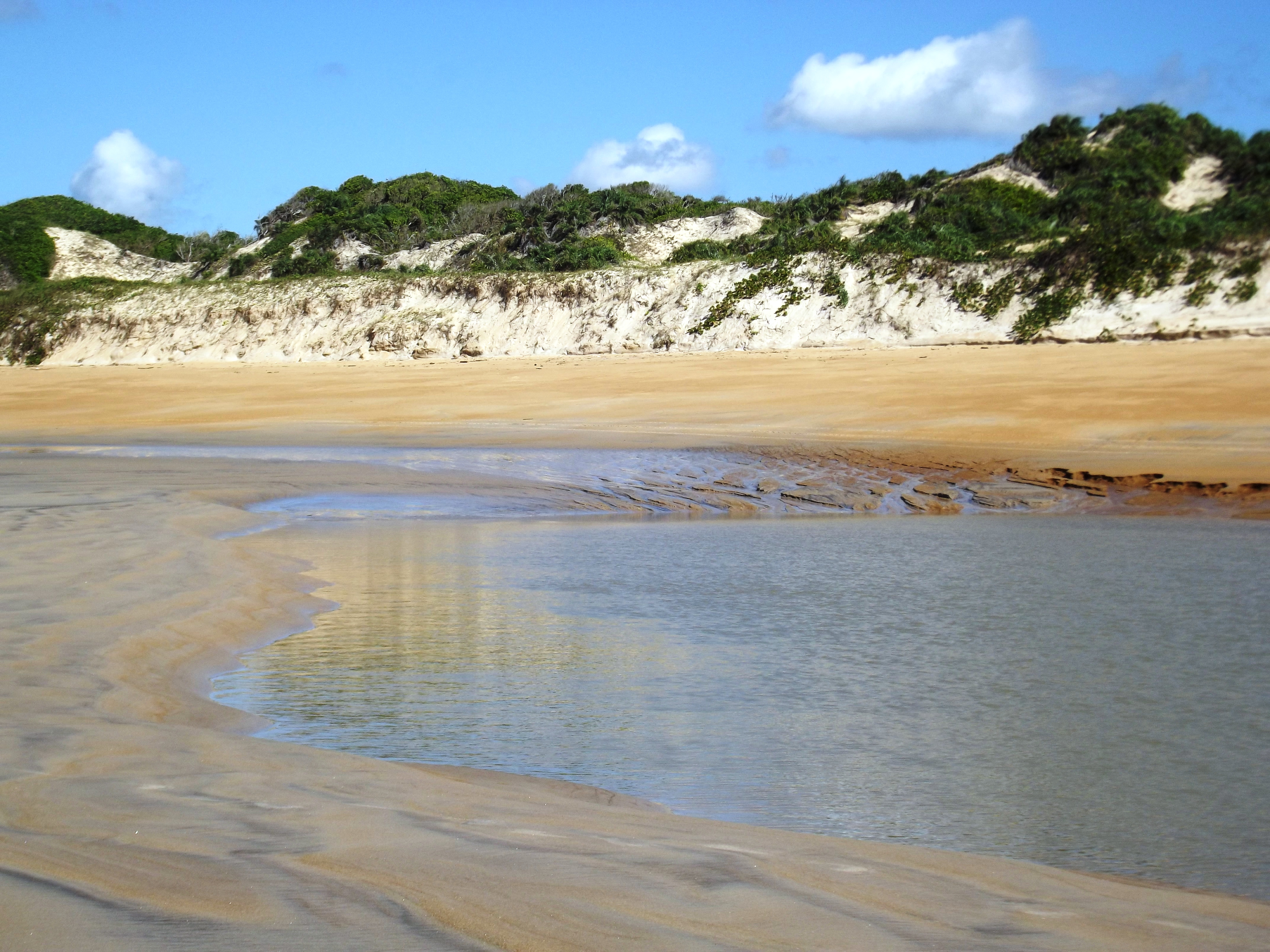 Insira_uma_descrição_para_sua_foto